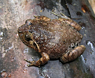 Rhombophryne alluaudi Nouvelle version de Rhombophryne alluaudi03.jpg : recadrage ; niveaux.